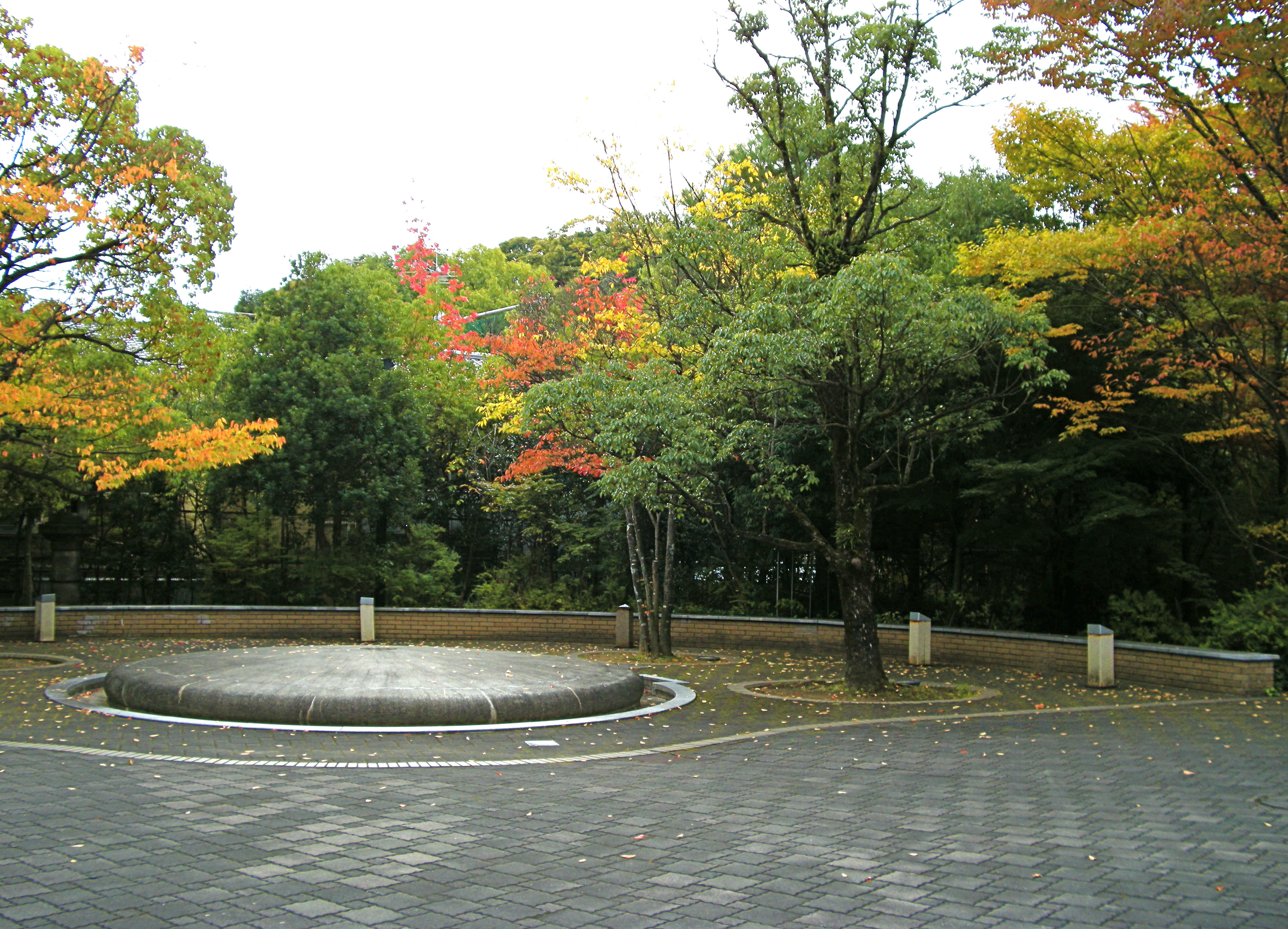 Saionji Memorial Hall Garden (Kinugasa Campus, Ritsumeikan University, Kyoto, Japan)